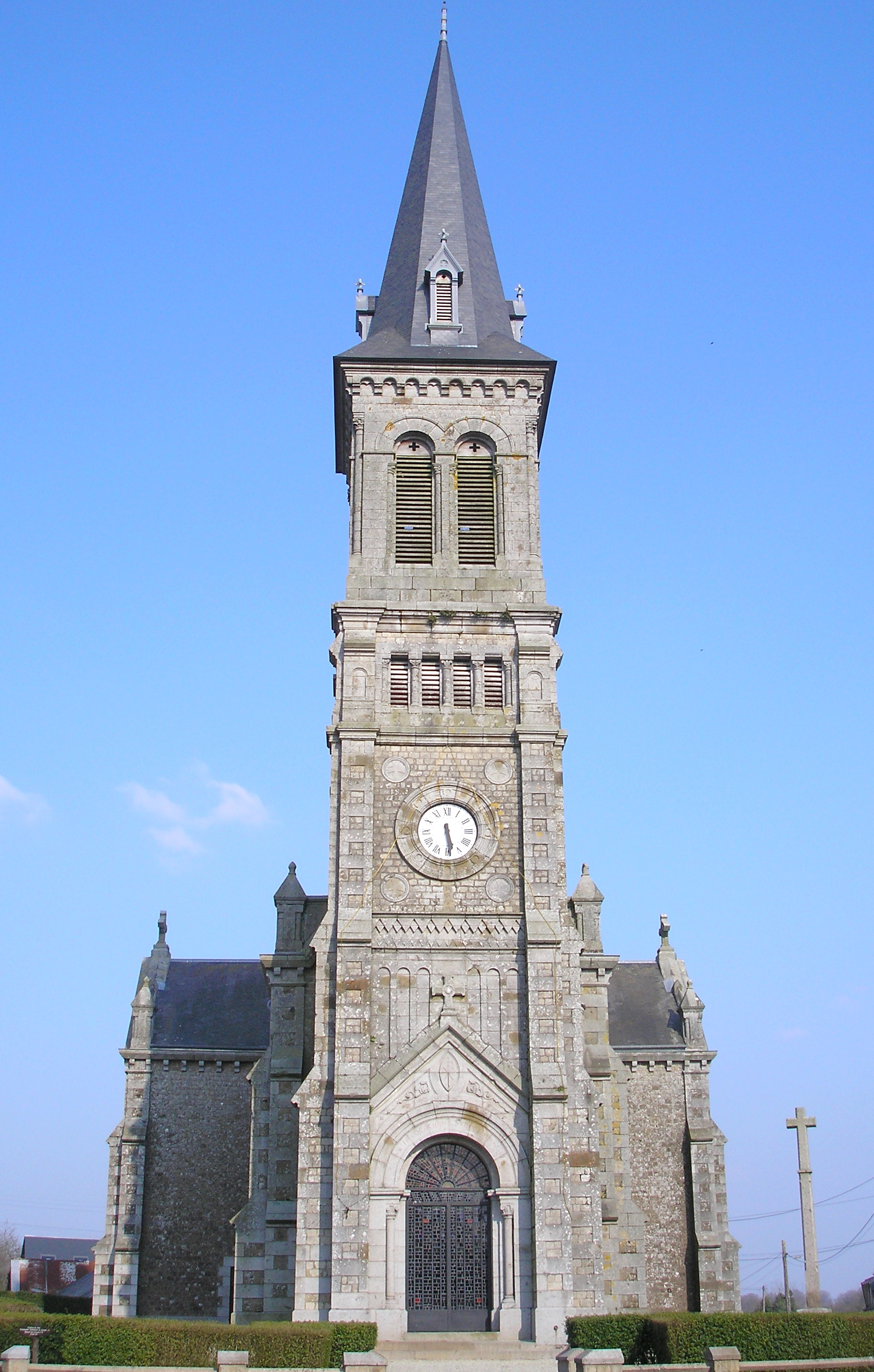 Truttemer-le-Grand (Normandie, France). L'église Saint-Martin.